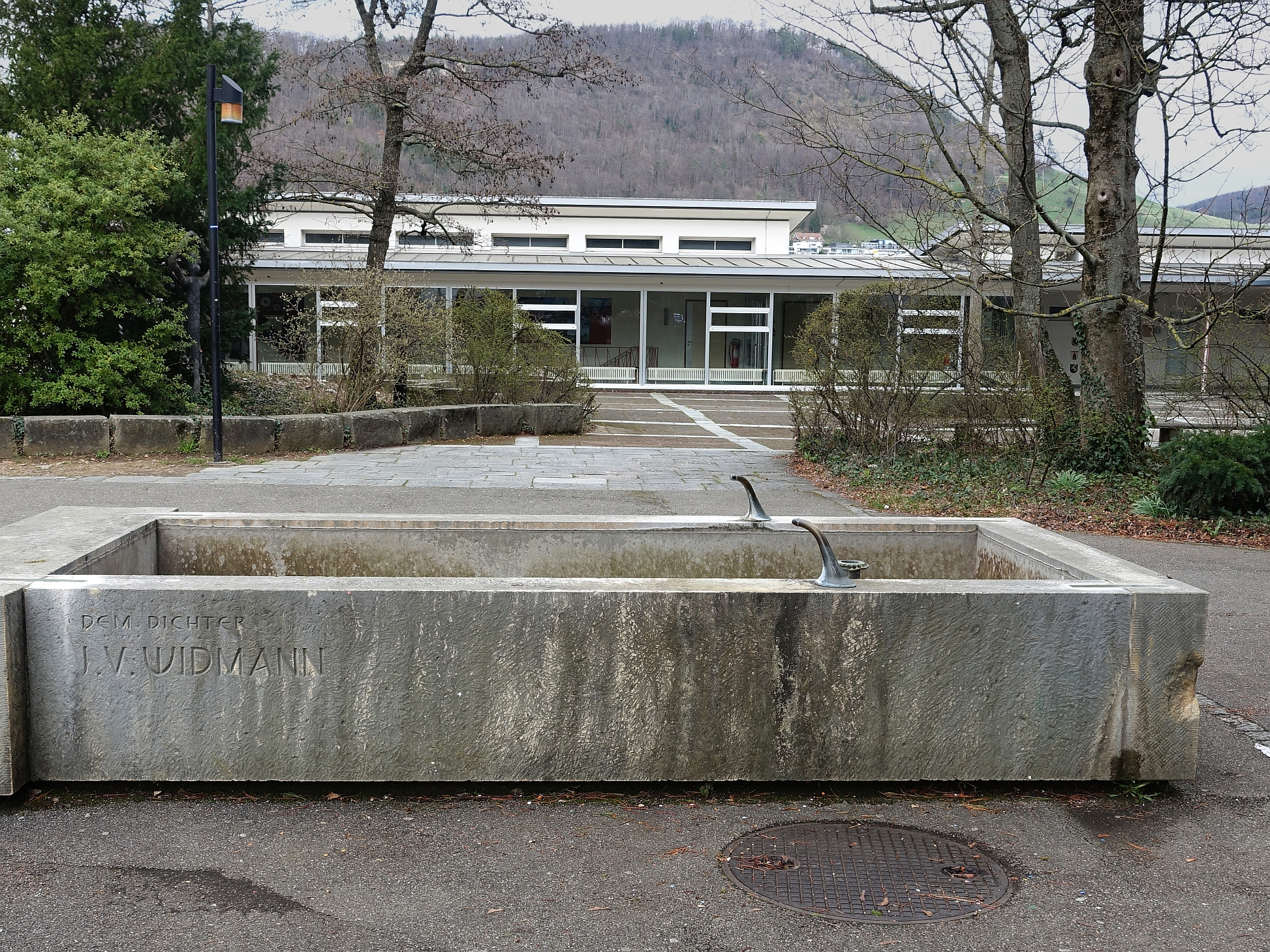 Widmann-Brunnen bei der Sekundarschule Burg in Liestal. Joseph Victor Widmann (1842-1911) war Schriftsteller, Redakteur, Feuilletonist, Literaturkritiker und Pädagoge.